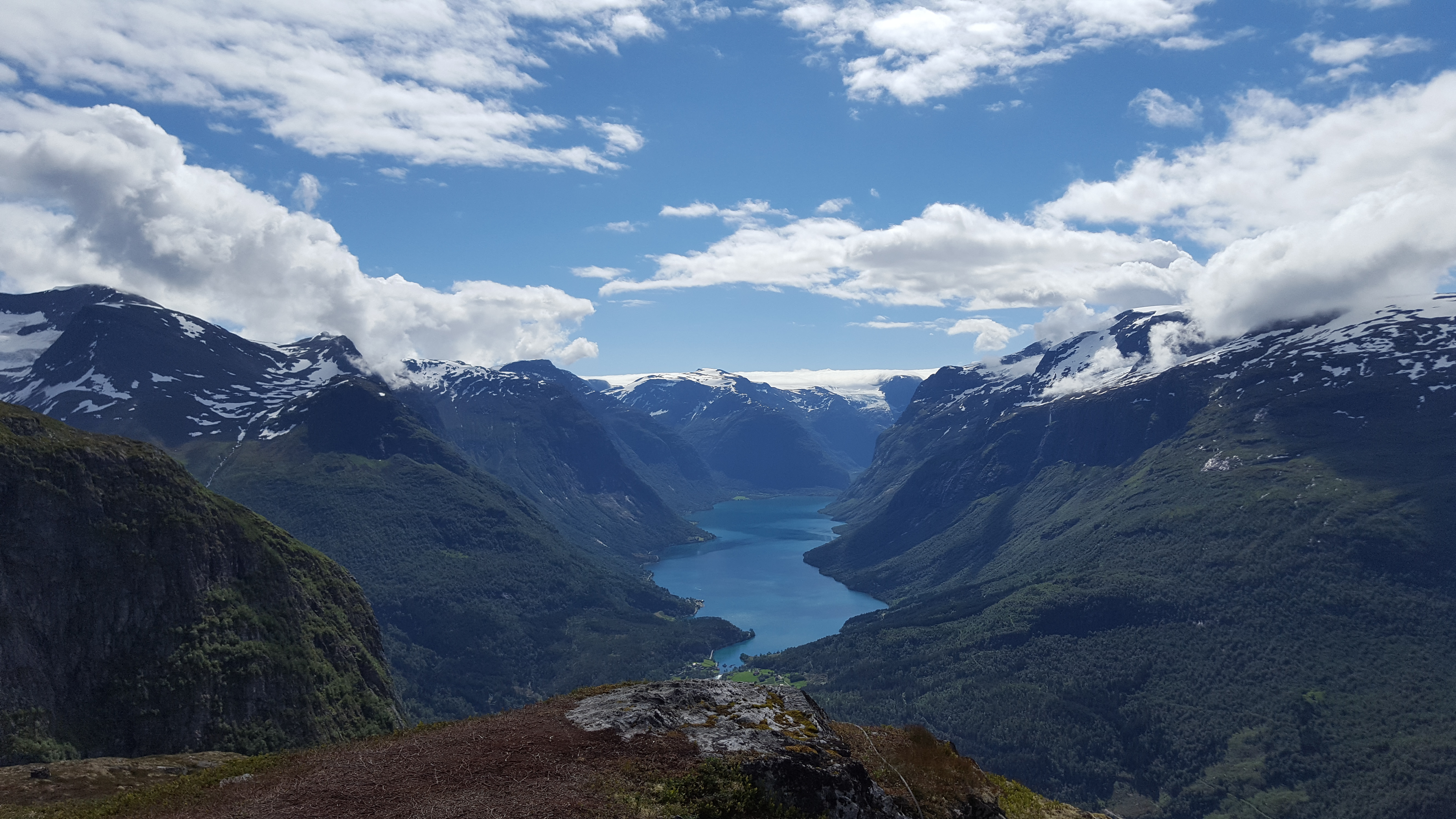 Utsikt til Lodalen fra Hoven.